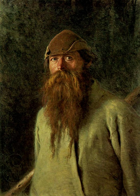 Один из крестьянских этюдов Крамского